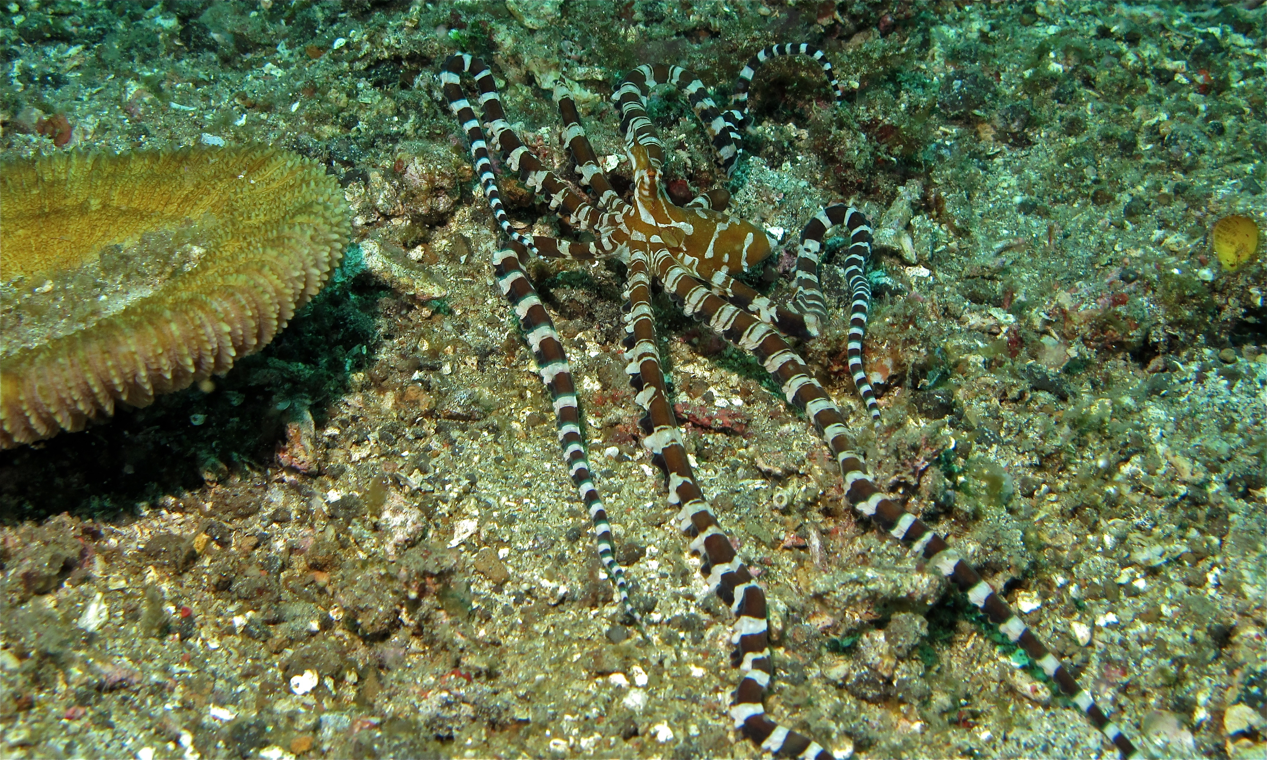 Tanjung Kubur, Lembeh Strait, Sulawesi, INDONESIA